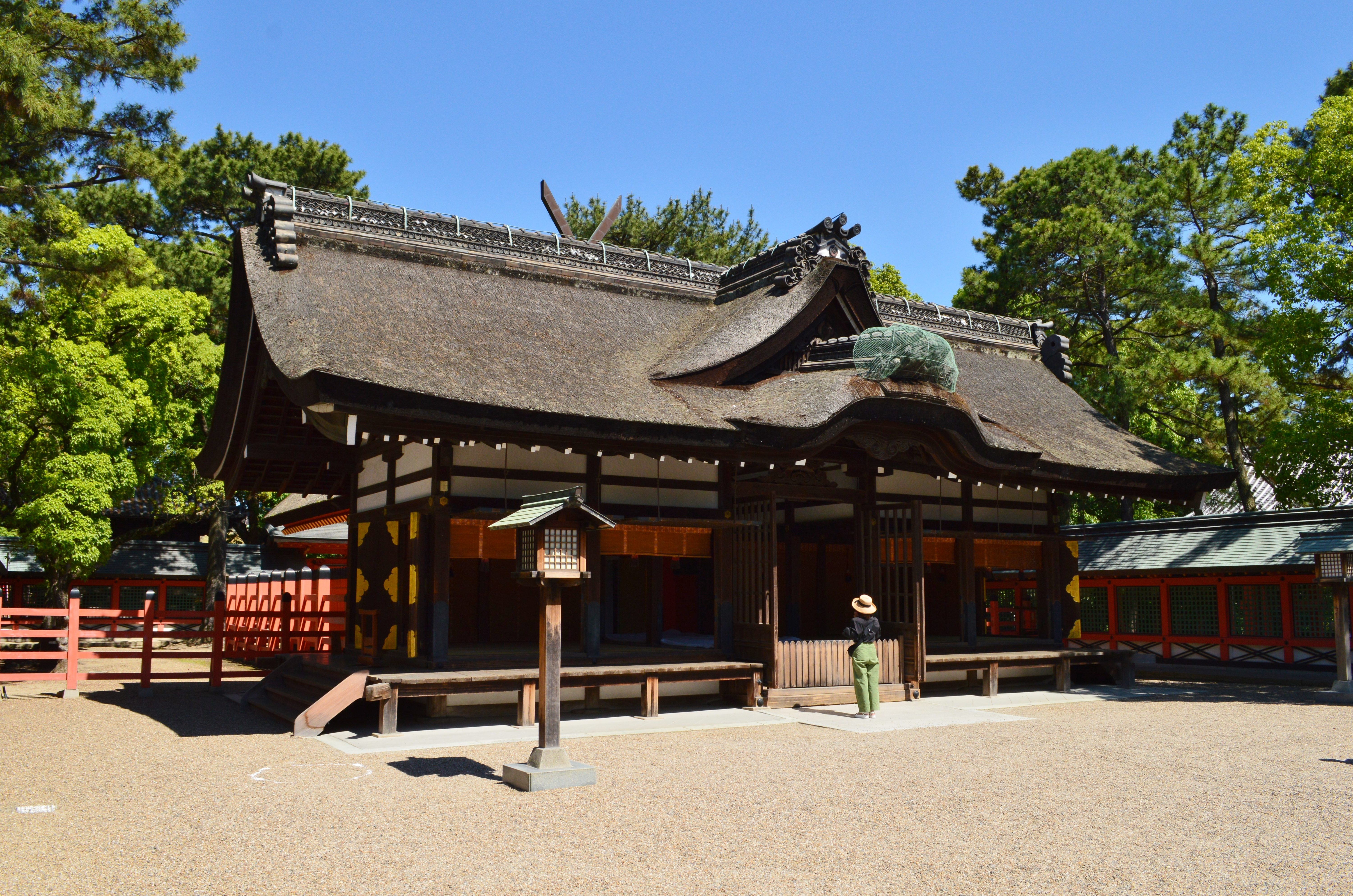 住吉大社 第一本宮幣殿